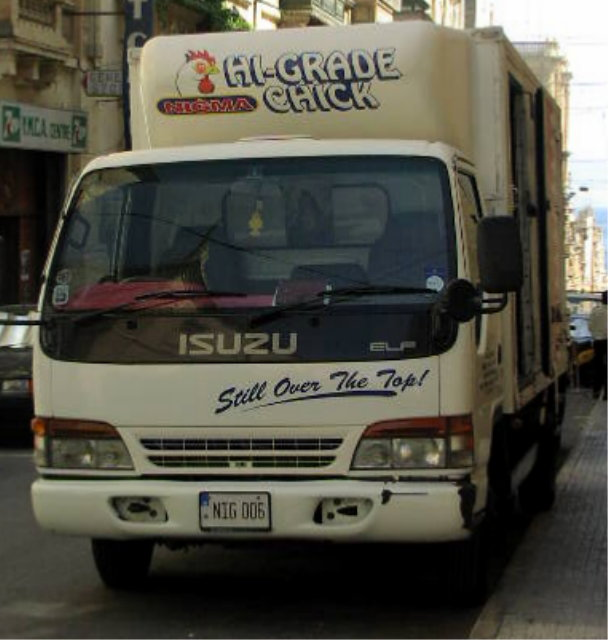 Isuzu Elf